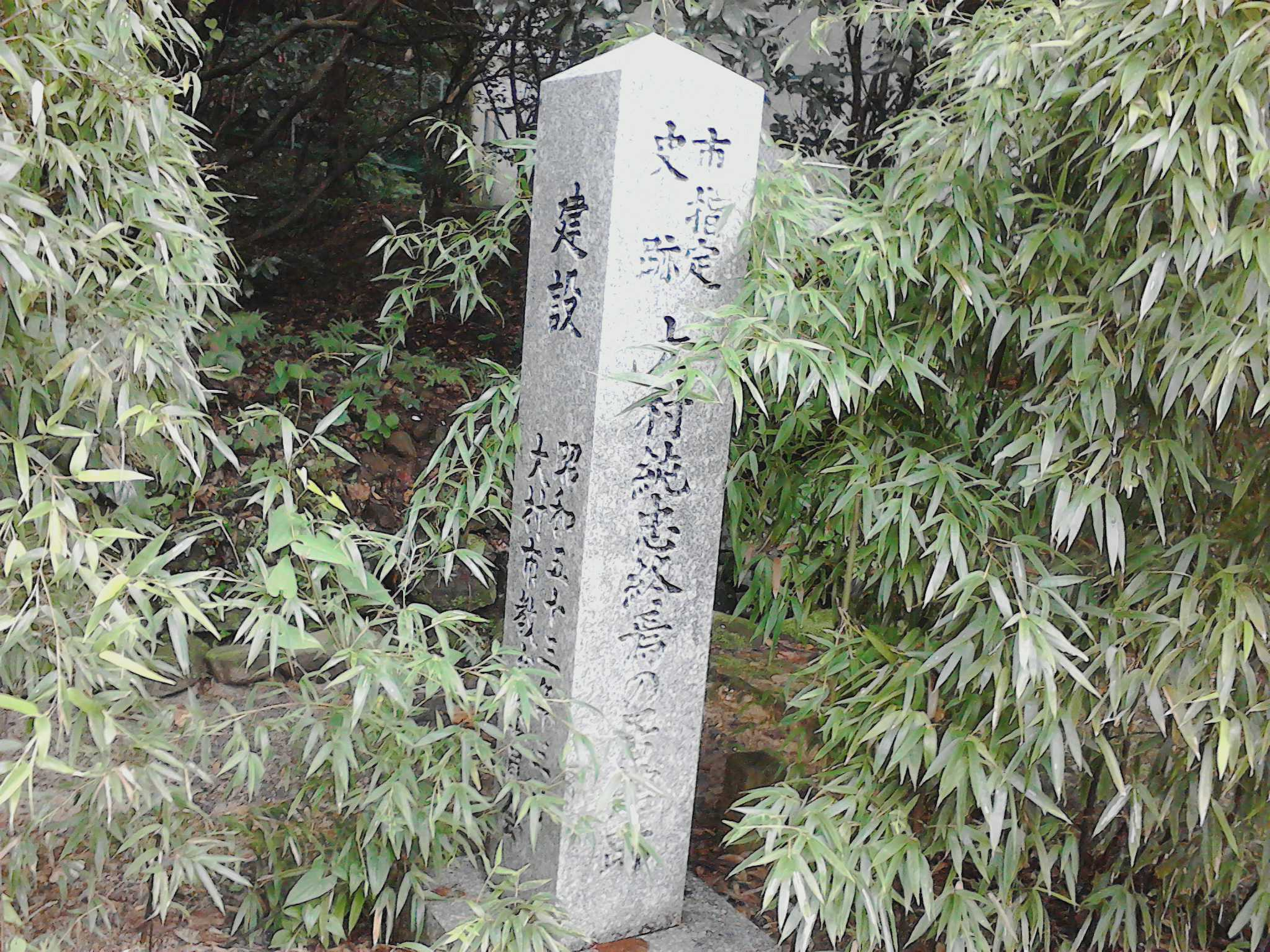 大村純忠終焉の居館跡